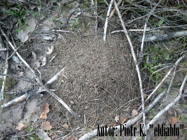 mrowisko w lasku w Osłonkach